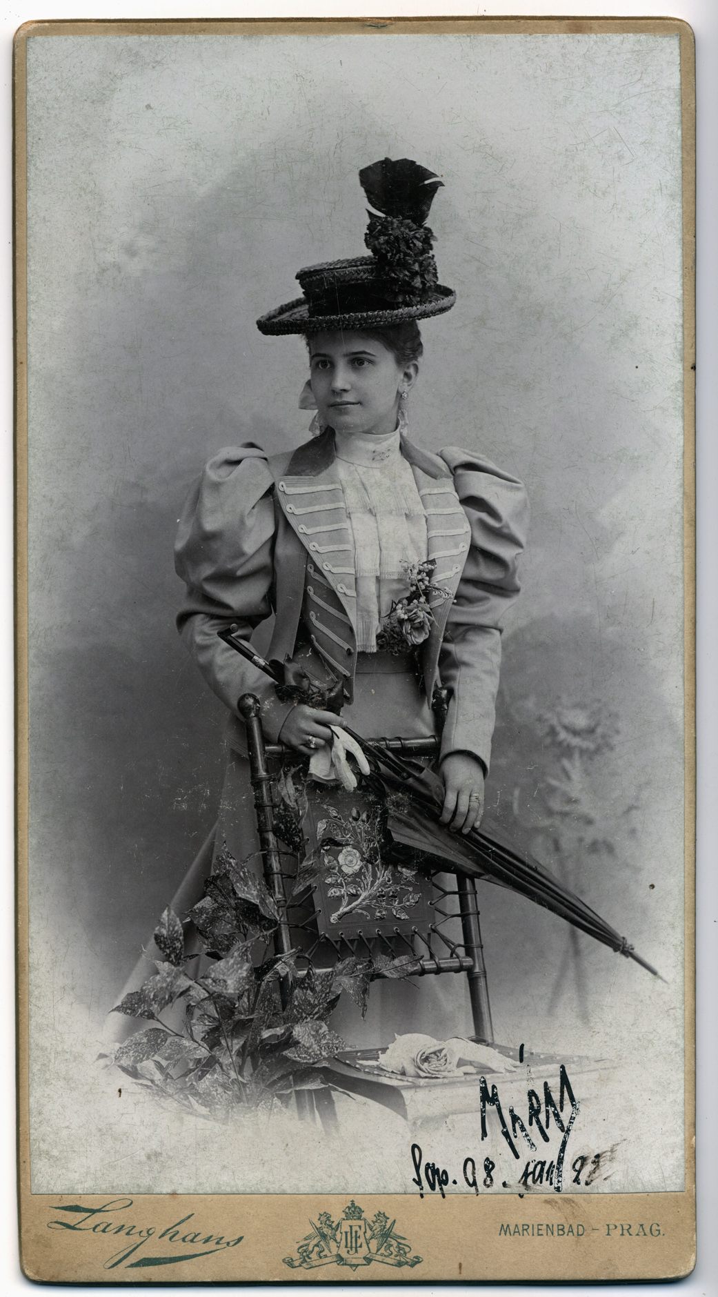 Unknown language: Jan Langhans: dama v klobouku